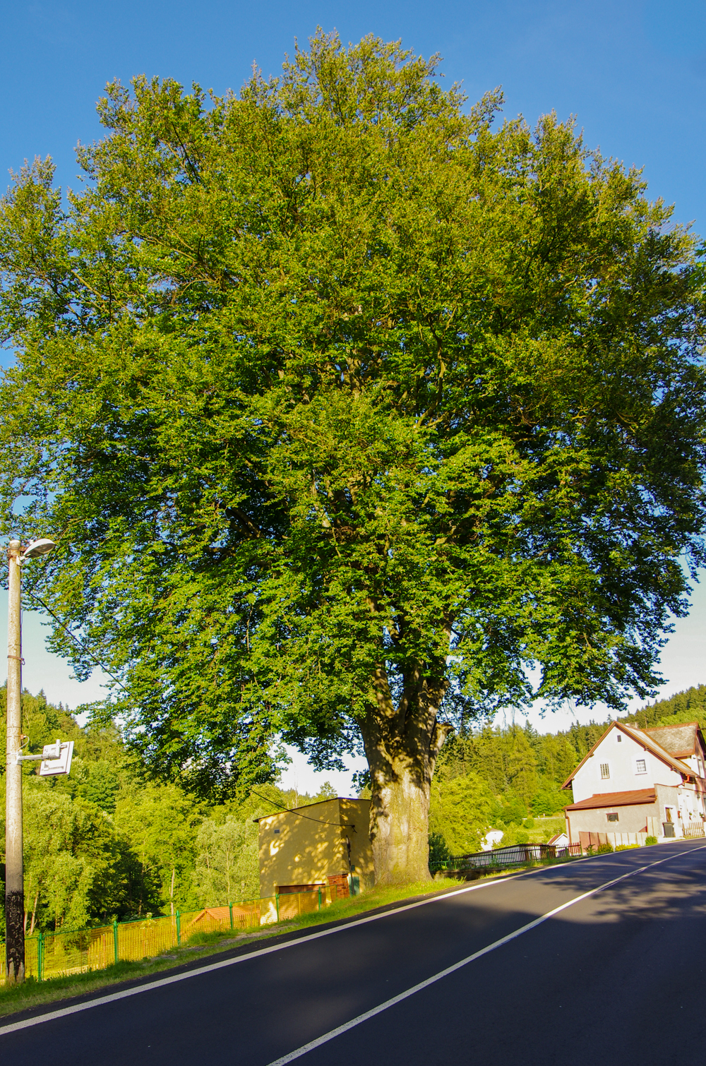 památný strom Buky nad Bečovem (dříve 2 stromy, nyní 1 strom), Bečov nad Teplou, Slavkovský les, okres Karlovy Vary